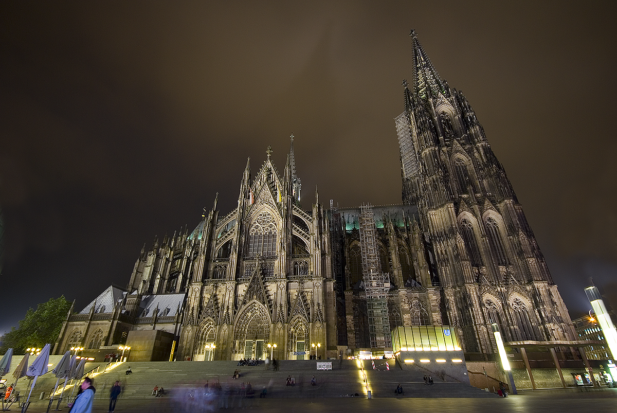 Köln Dom Katedrali.